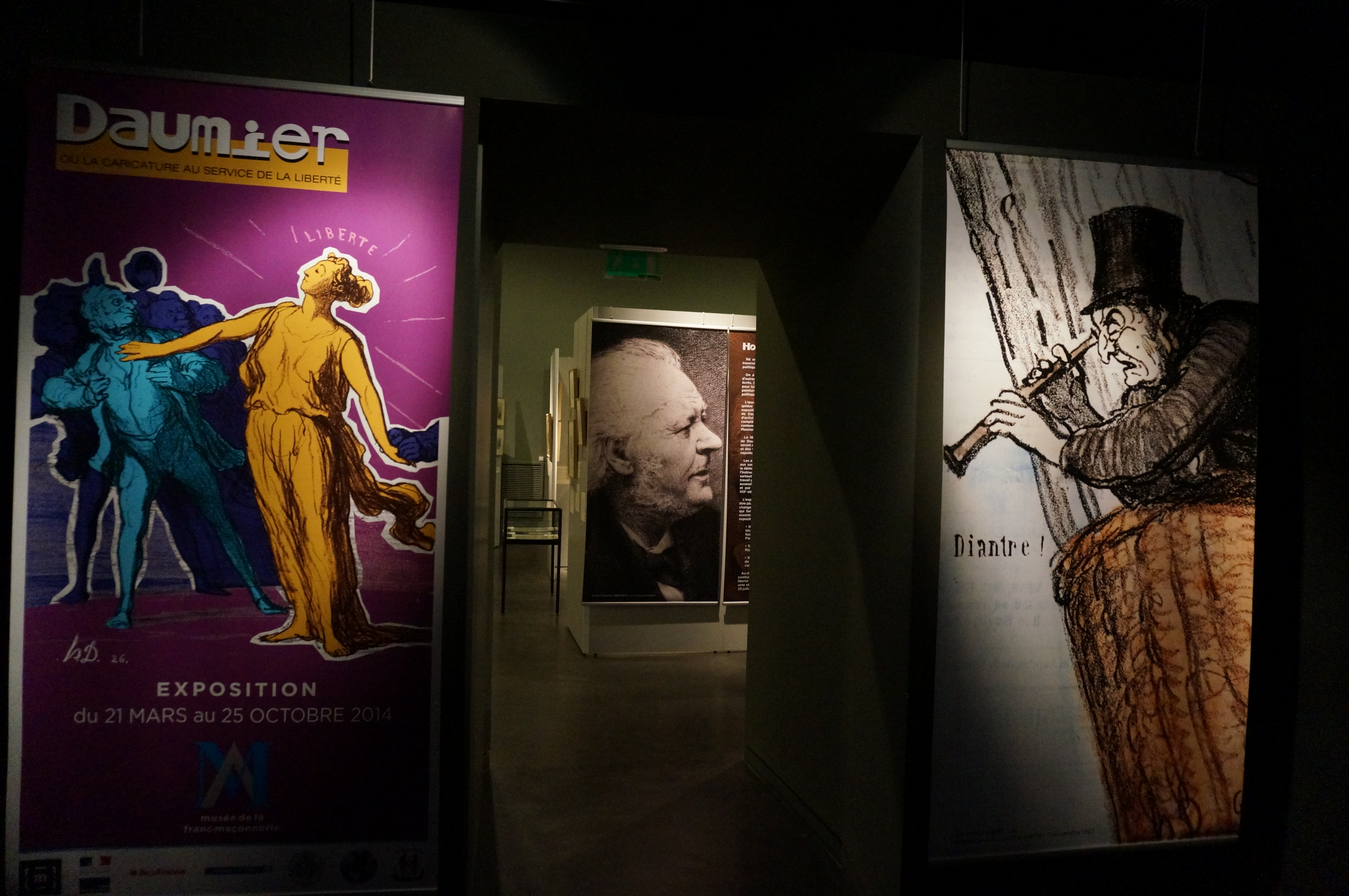 Collection du Musée de la Franc-Maçonnerie.